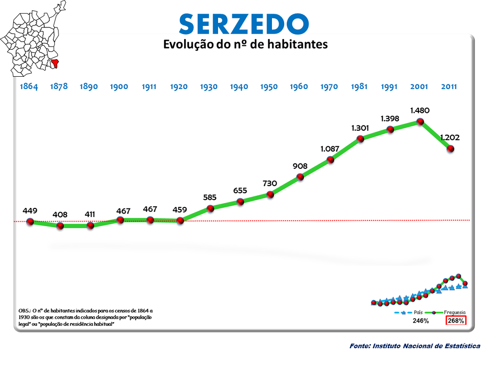 Censo 2011